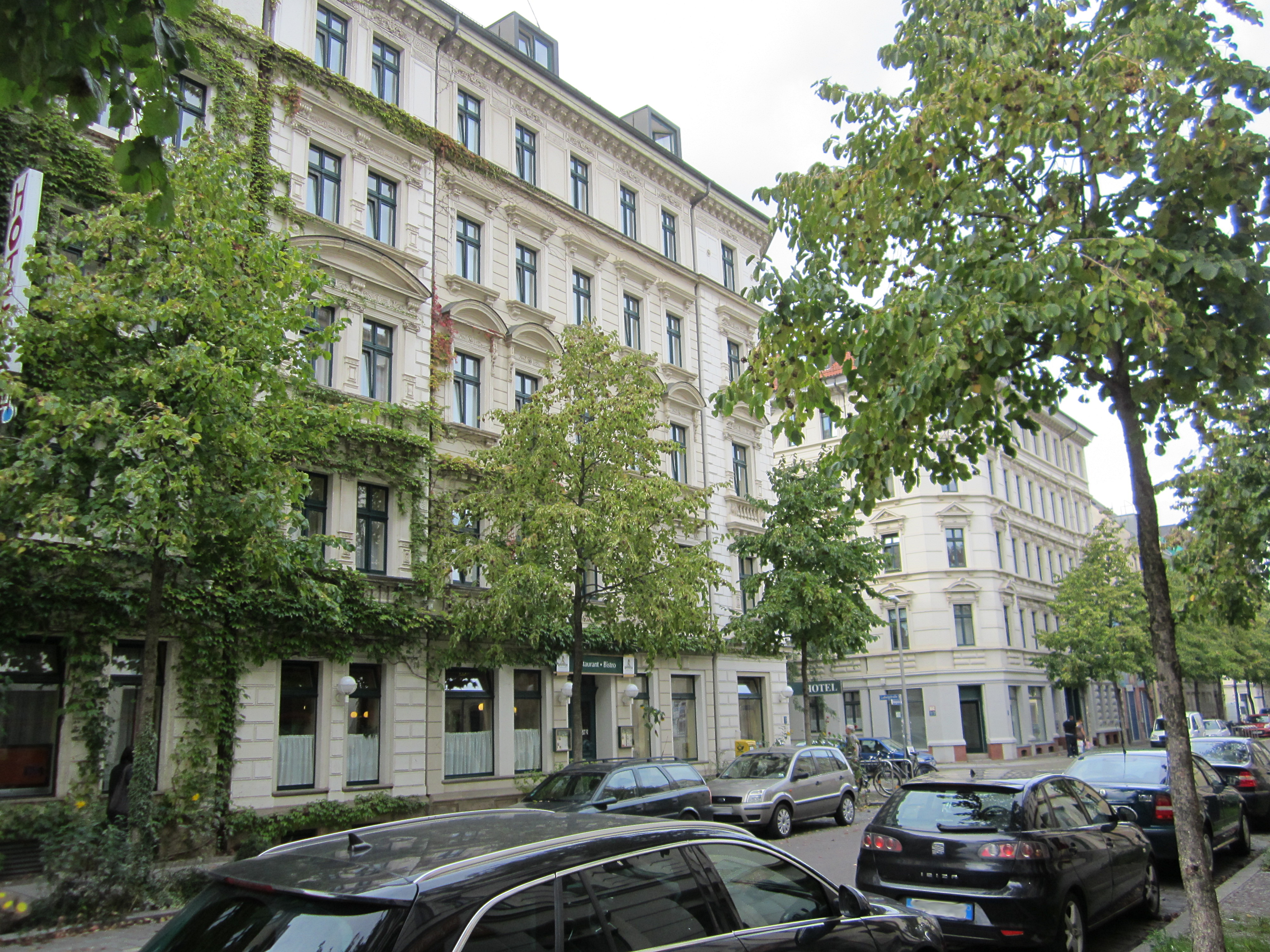 Hedwigstraße 3; Mietshaus in geschlossener Bebauung; mit Läden, Putzfassade; heute Hotel in Ecklage Ludwigstraße